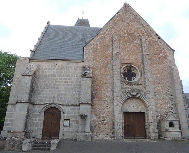 église Saint-Sébastien de Baignolet, façade occidentale avec le bas-côté nord ajouté au XVe s à gauche et le pignon roman avec ce portail à arcature de plein cintre et tympan à opus reticulatum et ce magnifique bénitier externe à droite, Eure-et-Loir, France.